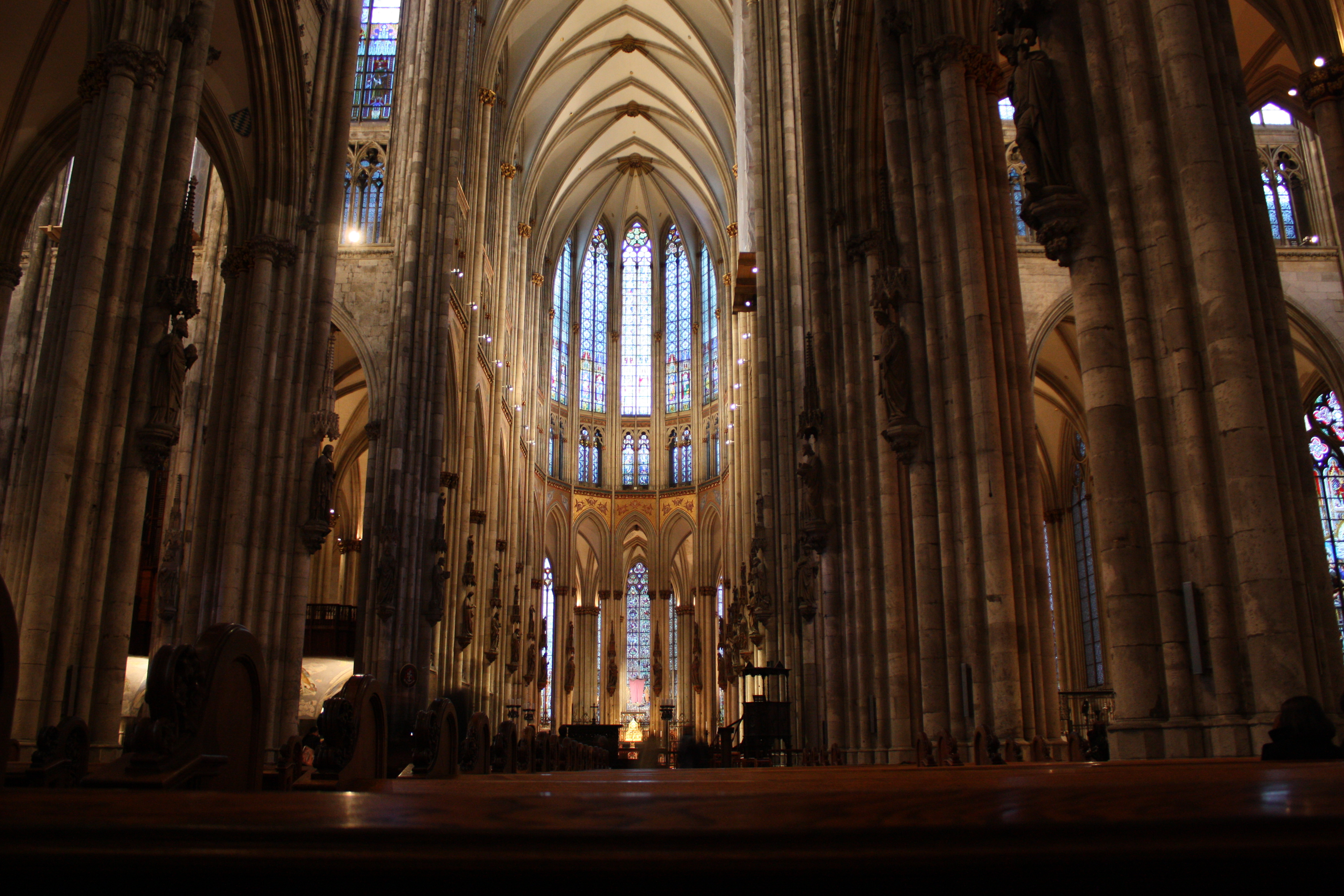 Köln, März 2009